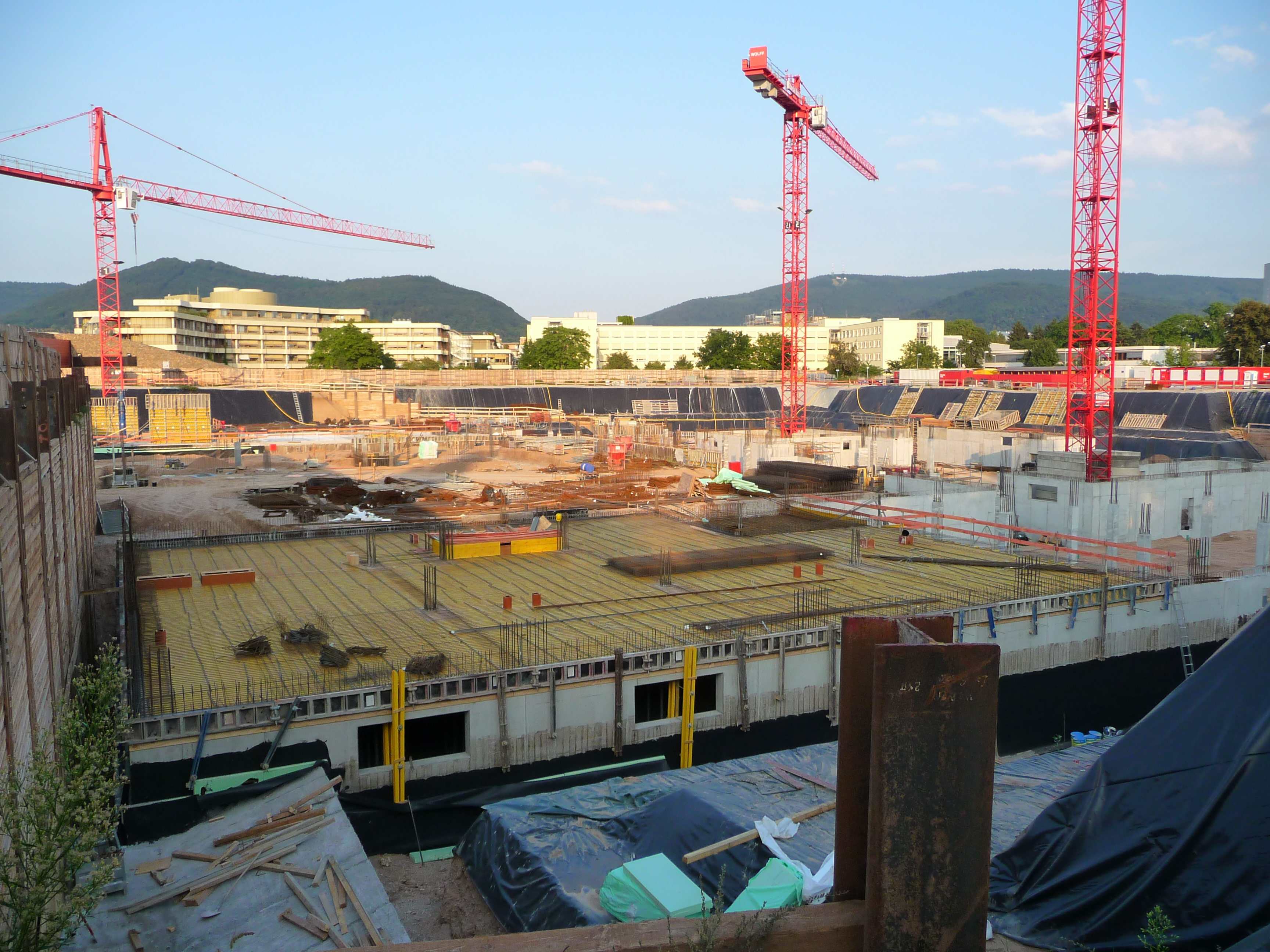 Heidelberg, Universitätsklinikum im Neuenheimer Feld: Großbaustelle der Frauenklinik und der Hautklinik, im Hintergrund links die Kopfklinik, rechts die Medizinische Klinik